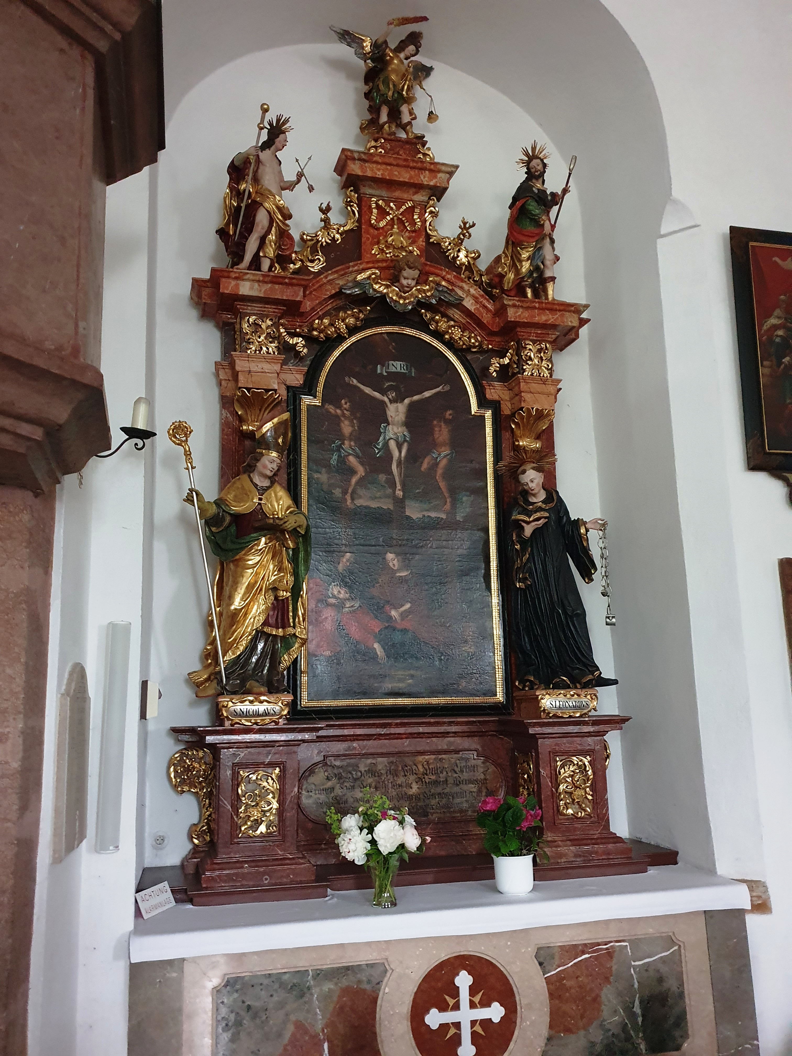 Altarblatt von Lorenz Mayerhofer, die Predella ist mit 1706 datiert